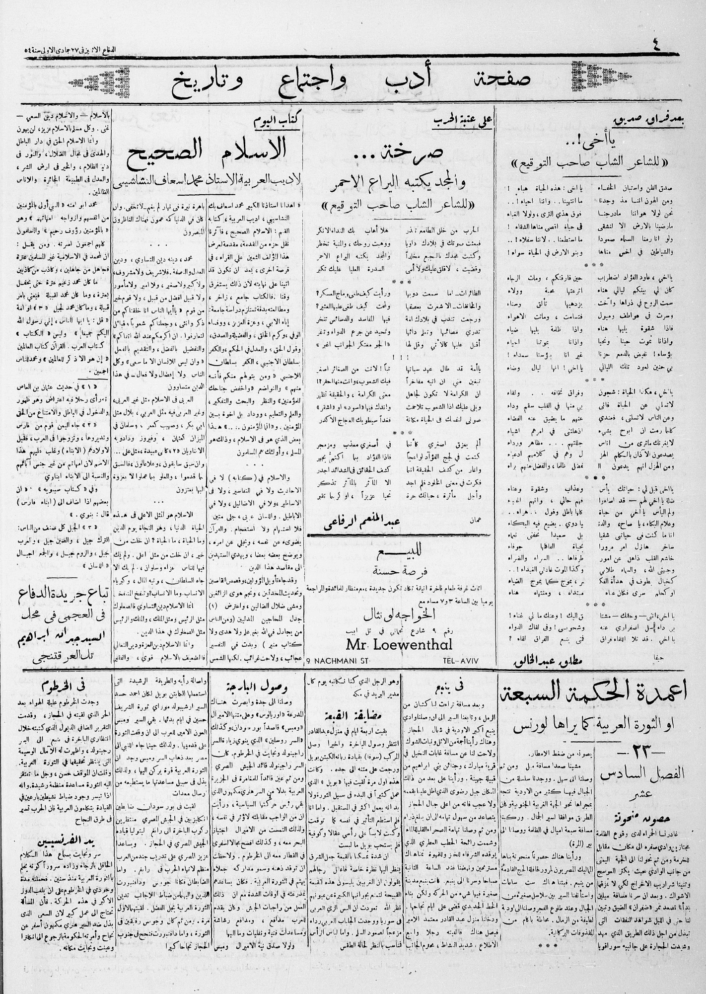 قصيدة بعنوان " يا أخي!" للشاعر الفلسطيني مطلق عبد الخالق في صحيفة الدفاع لإثنين, آب 26, 1935